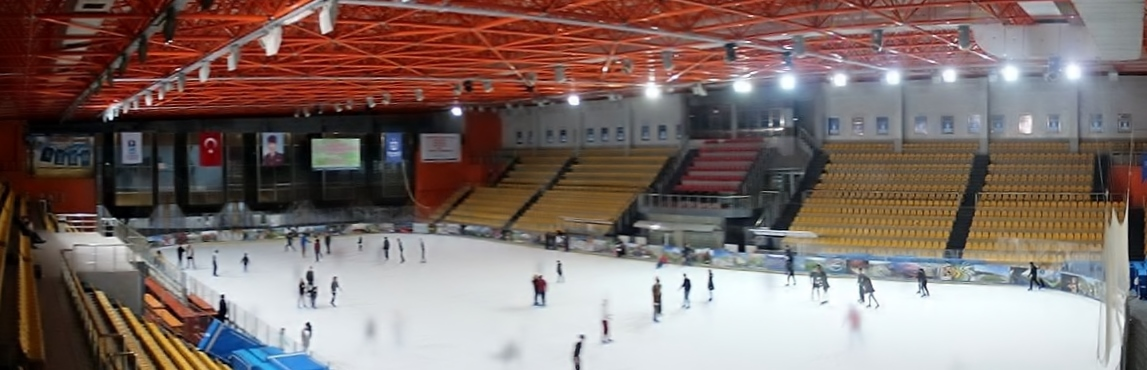 Kocaeli B.B. Ice Arena Panorama